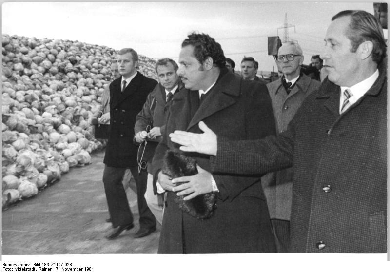 LPG Striegnitz, Besuch einer jemenitischen Delegation ADN-ZB Mittelstädt 7.11.81-Dresden: Besuch-LPG-Die von Ali Nasser Mohammed (3.v.r.) geleitete Partei- und Staatsdelegation der VDRJ überzeugte sich in der LPG "Helmut Just" in Striegnitz (Kreis Meissen) vom hohen Niveau genossenschaftlicher Arbeit. LPG-Vorsitzender Gottfried Leder (1.v.r.) erläuterte dem Gast die Methoden der Bodenbewirtschaftung. (2.v.r. Willi Stoph)